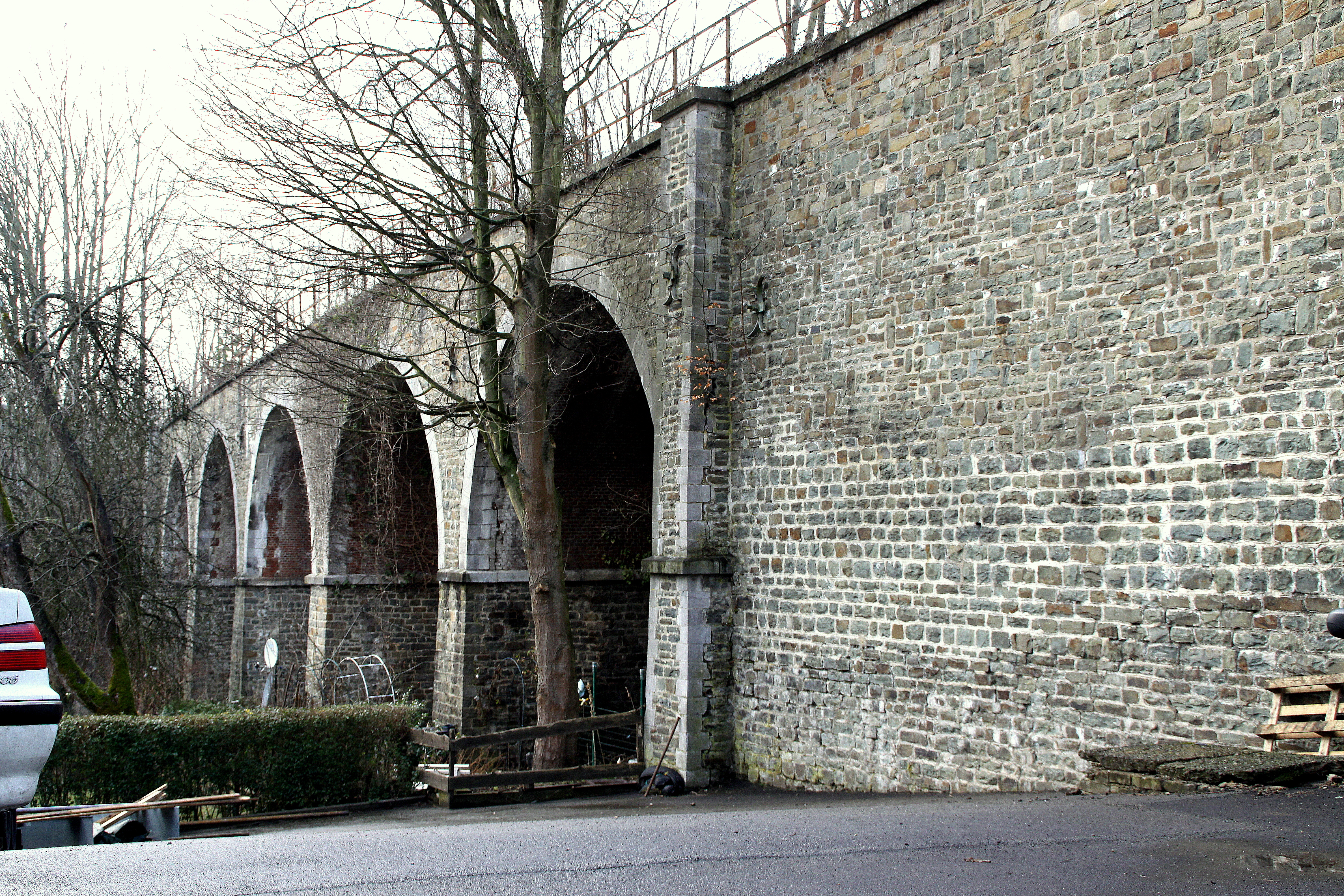 Bréck vun der fréierer Linn Lëtzebuerg-Spa zu Spa